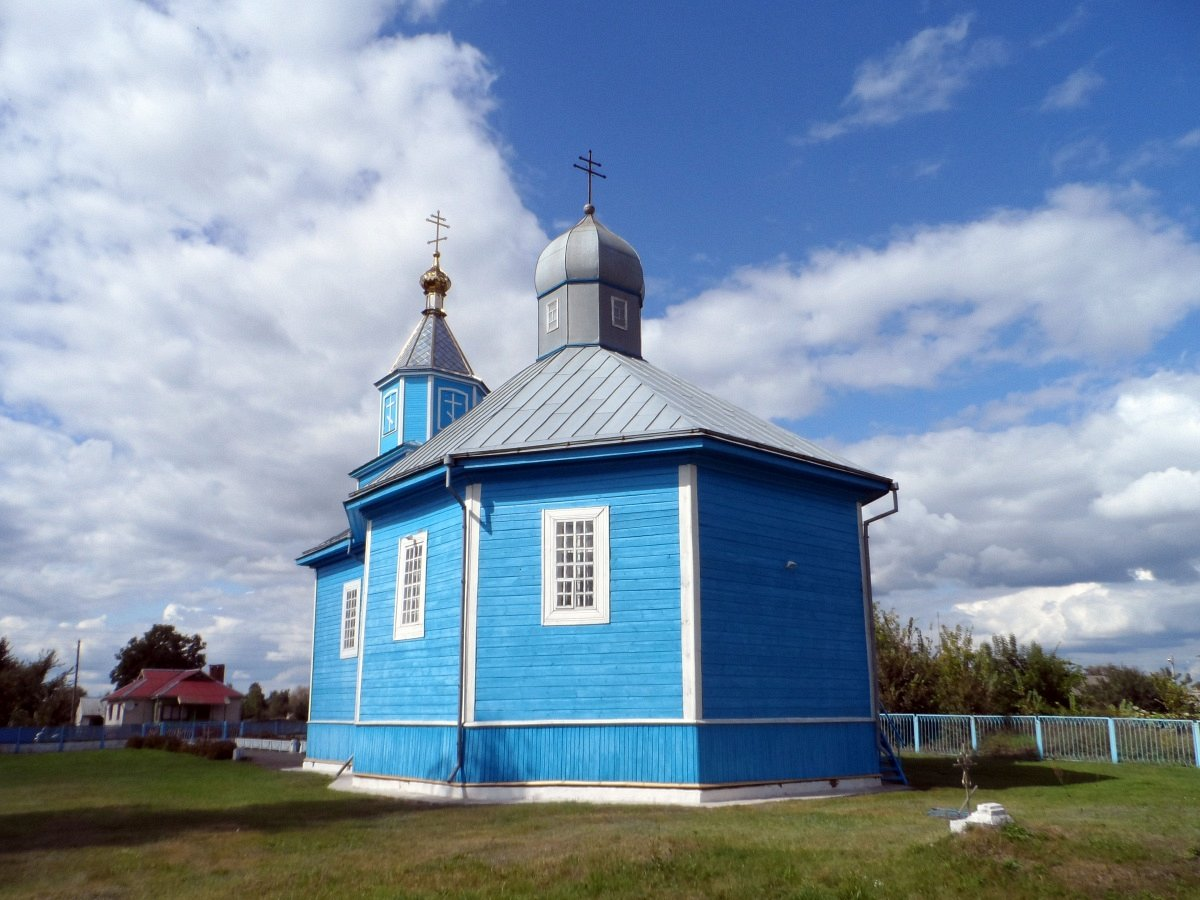 Лунін. Царква